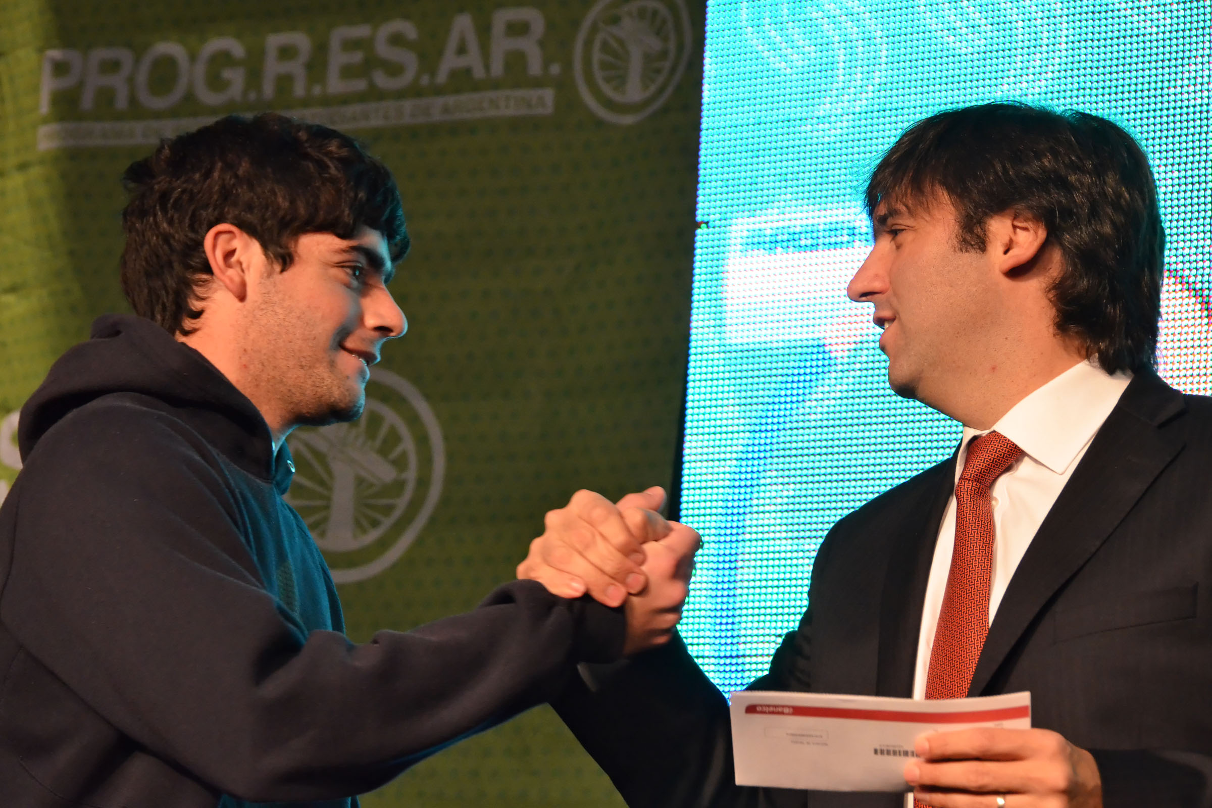 PROGRESAR